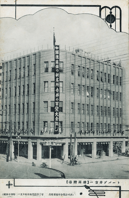 Yoshii Hyakkaten, Takao